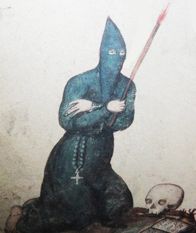 Photo d'un document d'archives datant du 19e siècle, trouvé dans l'église Saint-Jérôme de Toulouse.